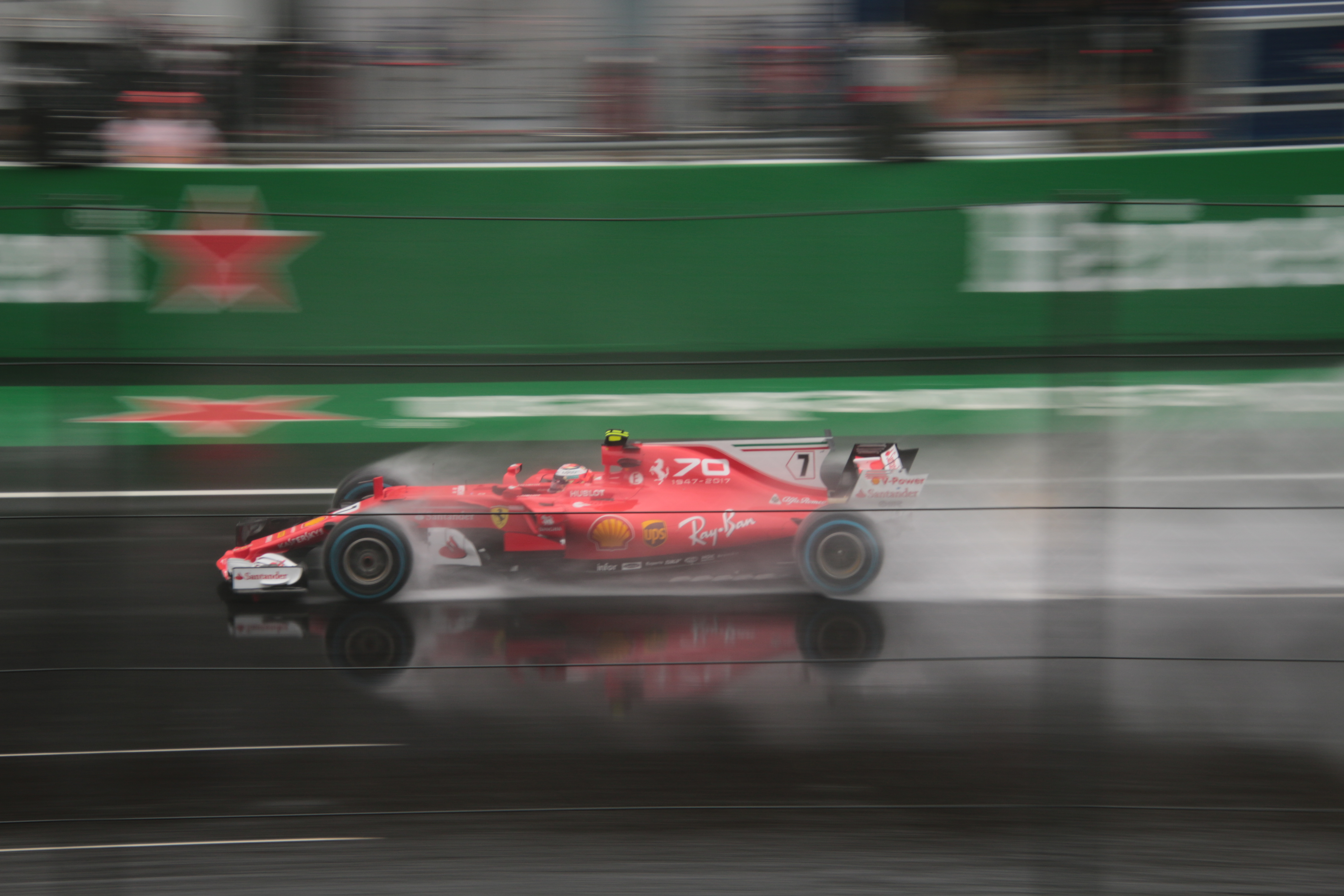 この頃はまだ跳ね馬が速いと信じていました